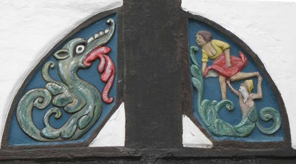 Schnitzerei am Fachwerk des Ratskeller in Wiedenbrück